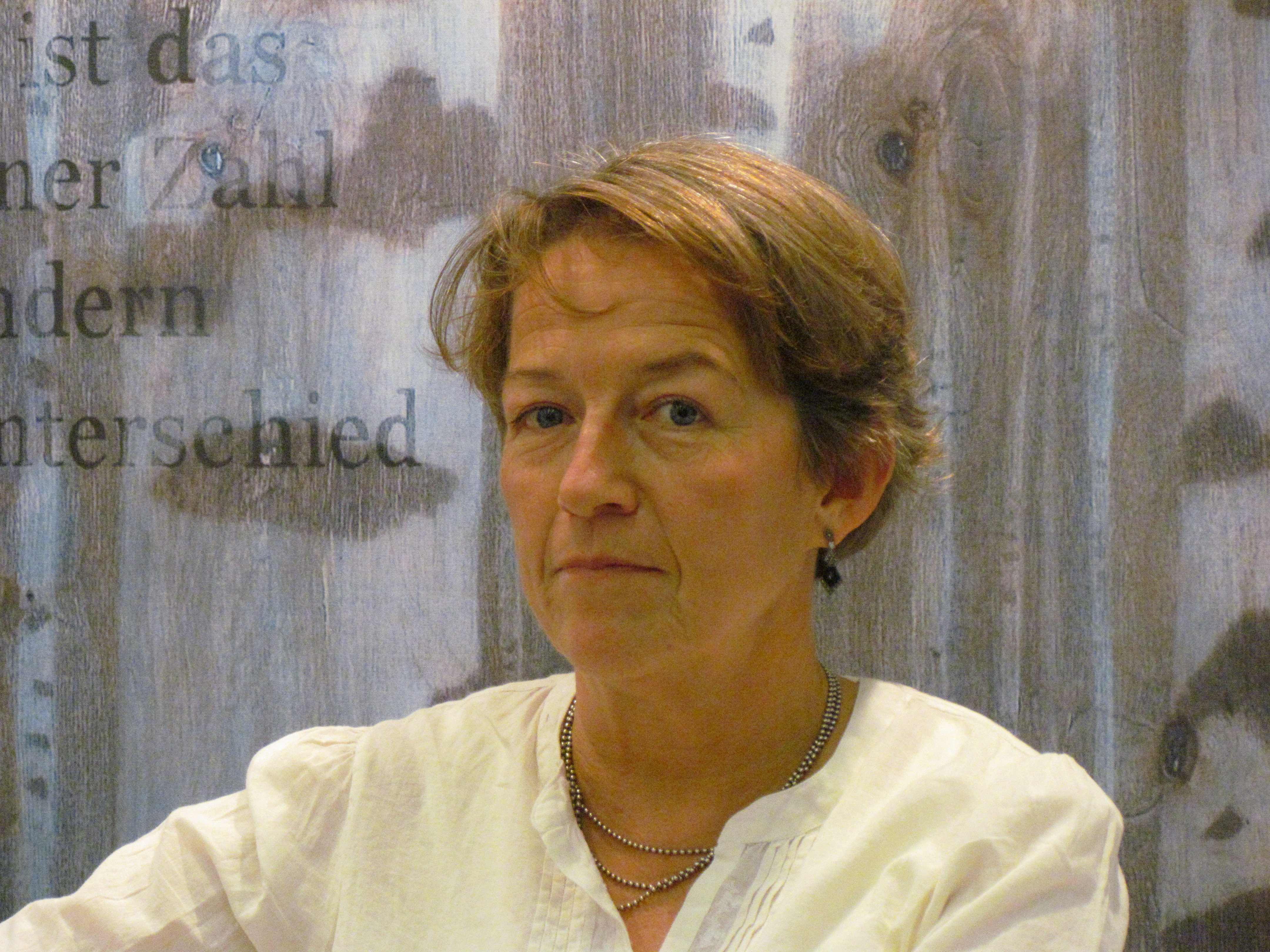 Janina Orlov i Finlands monter på Bokmäsan 2011.